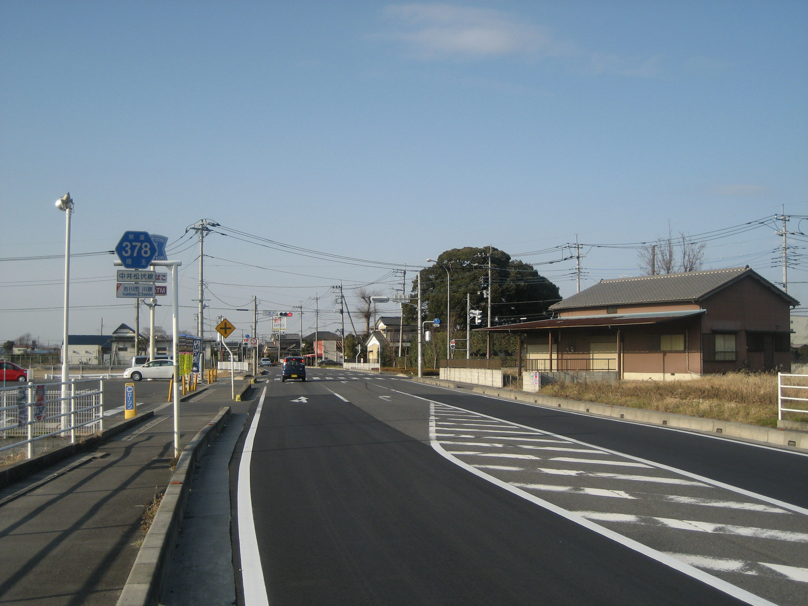 埼玉県道378号線吉川市内